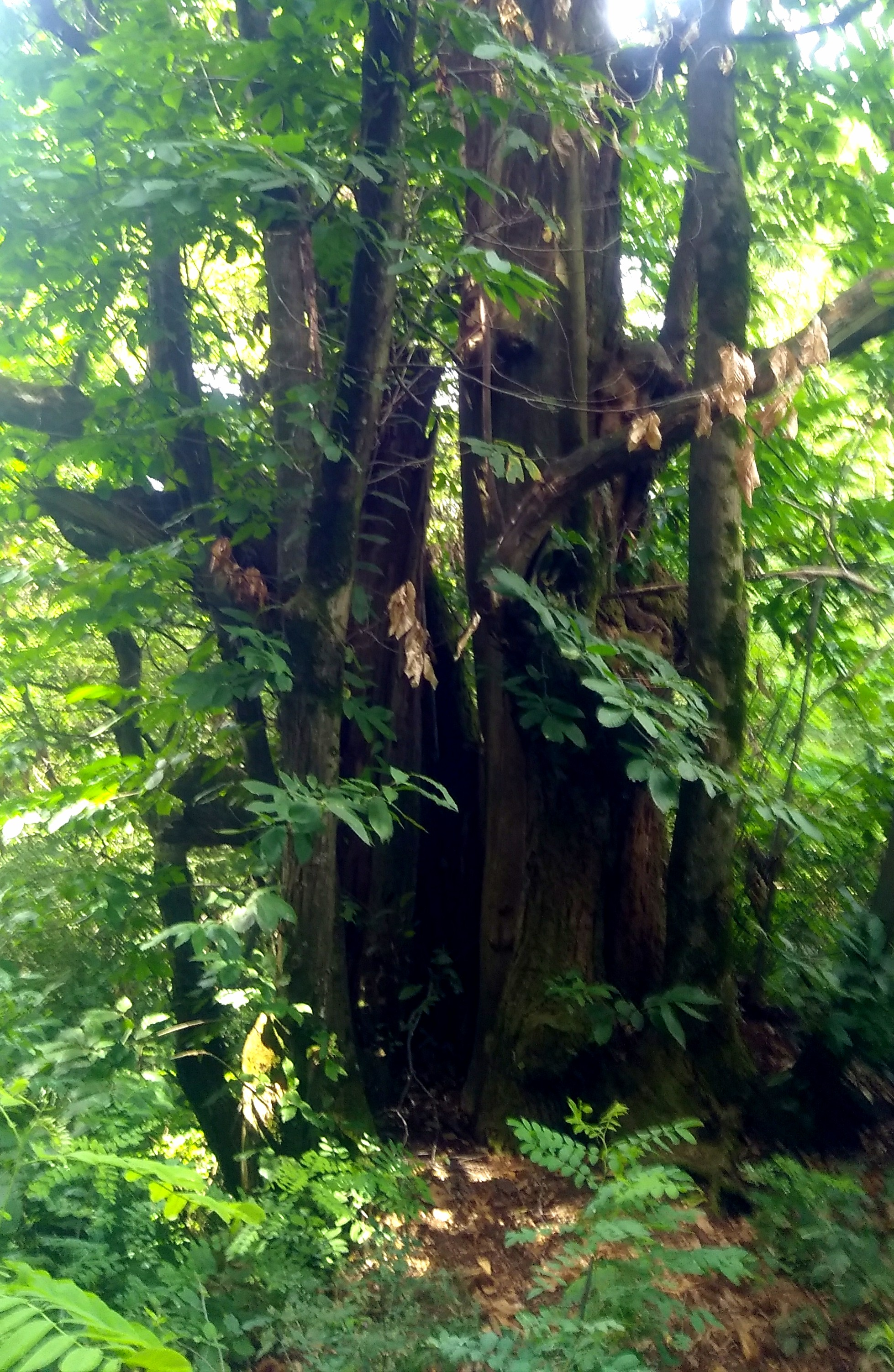 Villa del Bosco (Biella): il castagno secolare nei pressi del cimitero